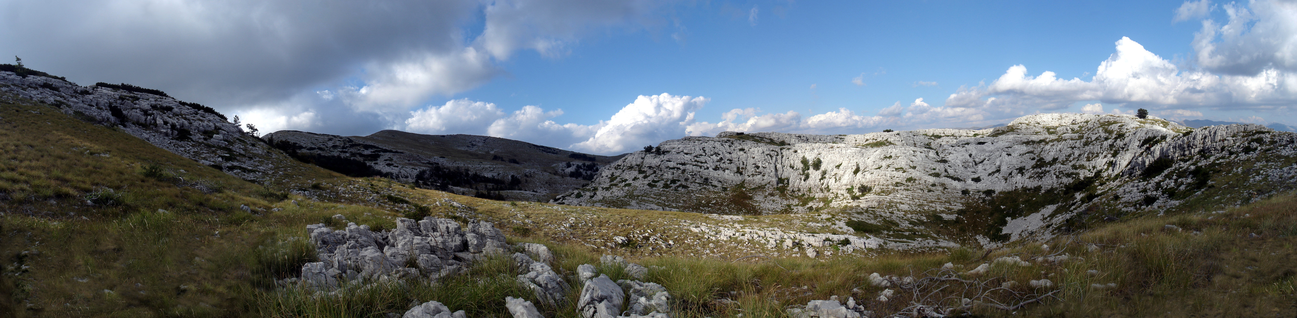 Vistas along the way from Glavaš to the top of Dinara (Croatia)